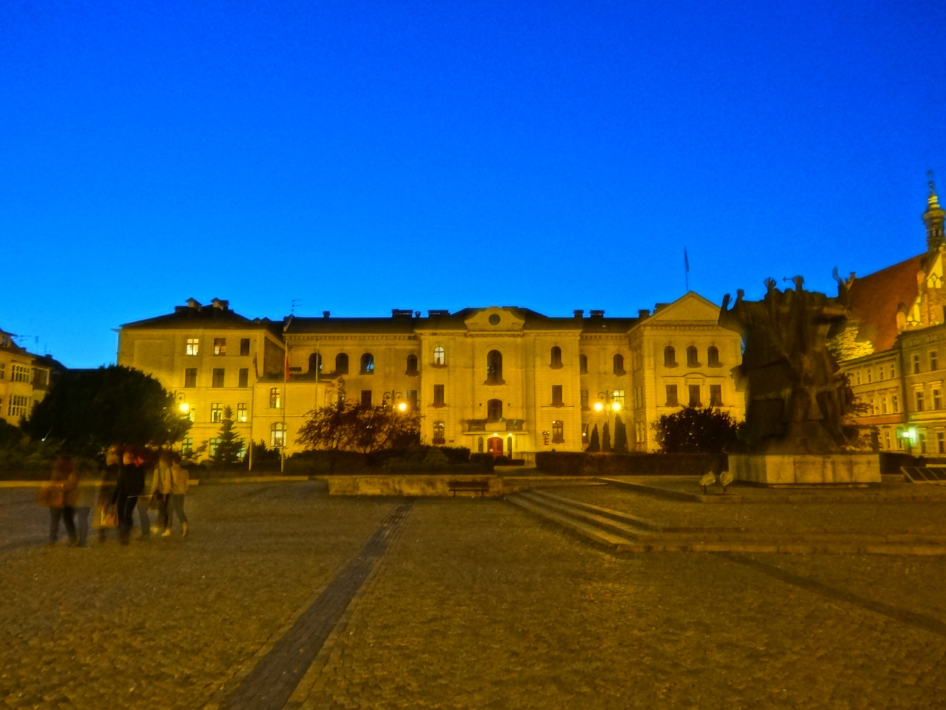 Stary Rynek w Bydgoszczy